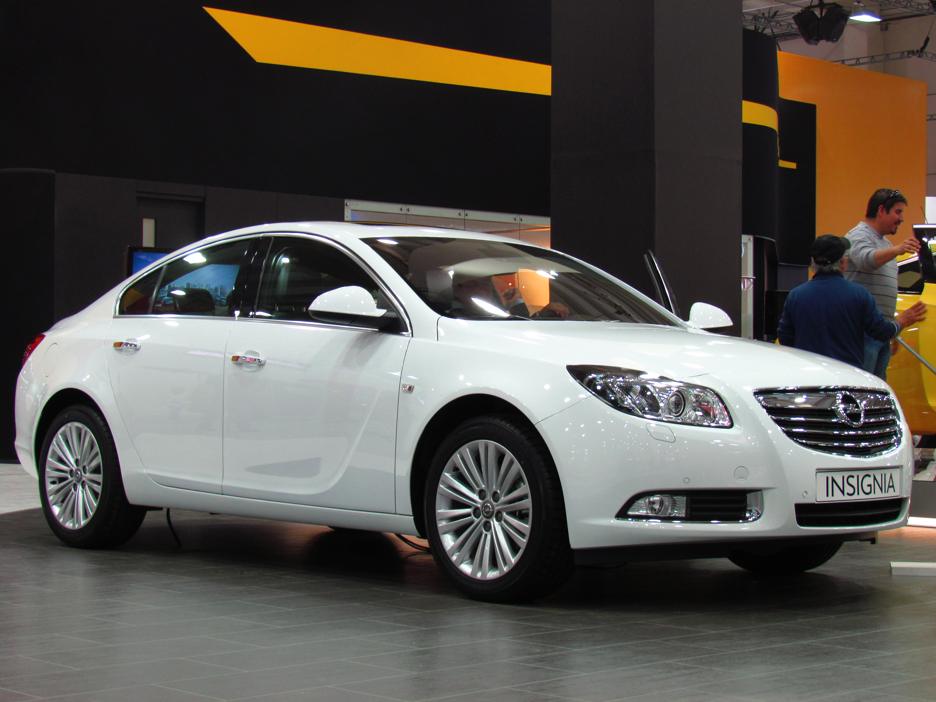 Opel Insignia 2.0 Turbo 2013